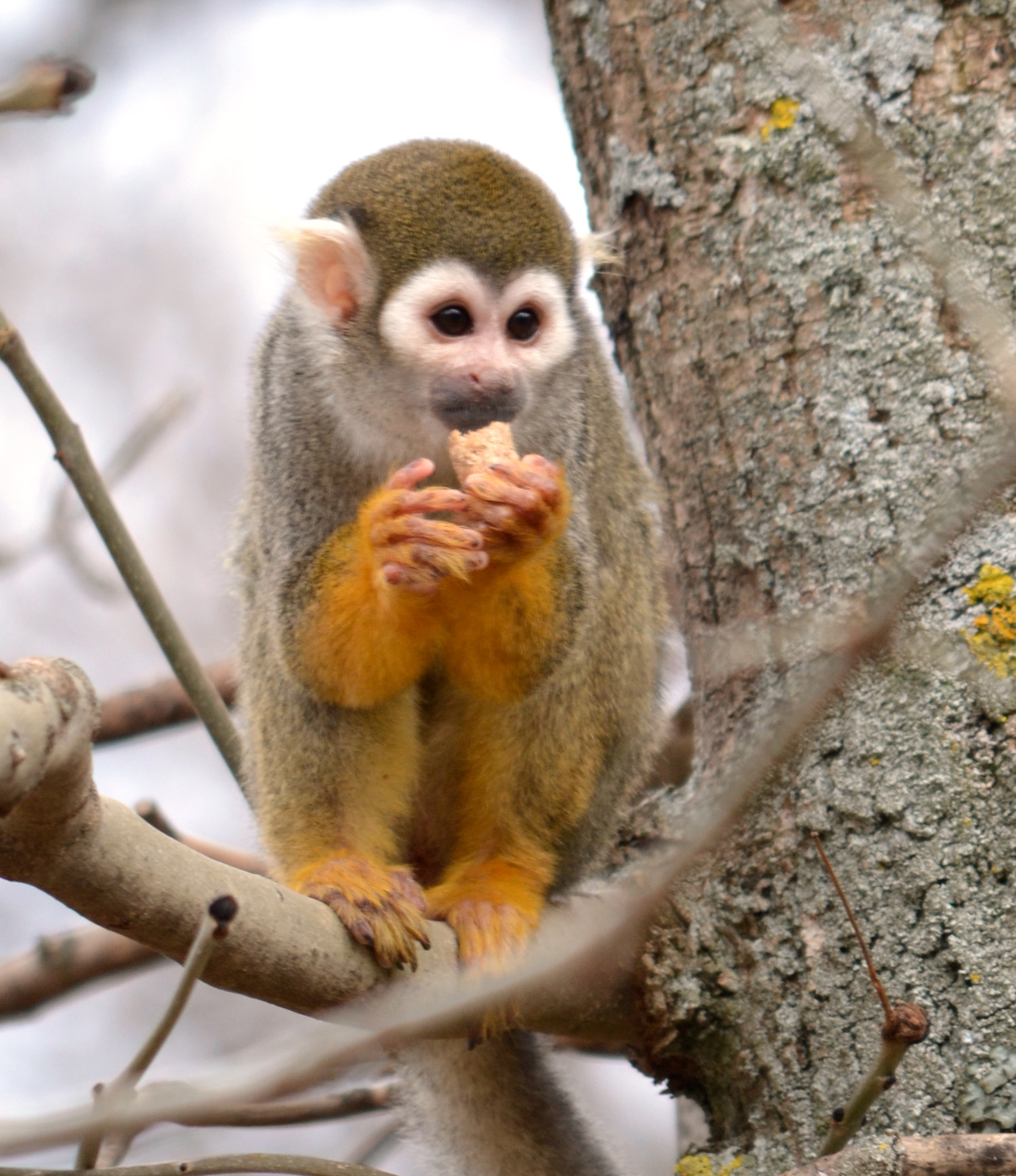 Saïmiri Parc Animalier d'Auvergne